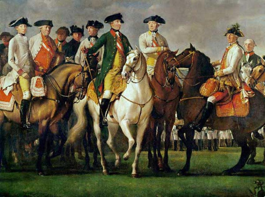 Martin Ferdinand Quadal (1736–1808): Kaiser Joseph II. mit Franz II. (links) und der Generalität im Lager bei Münchendorf, 1786. Heeresgeschichtliches Museum, Wien.